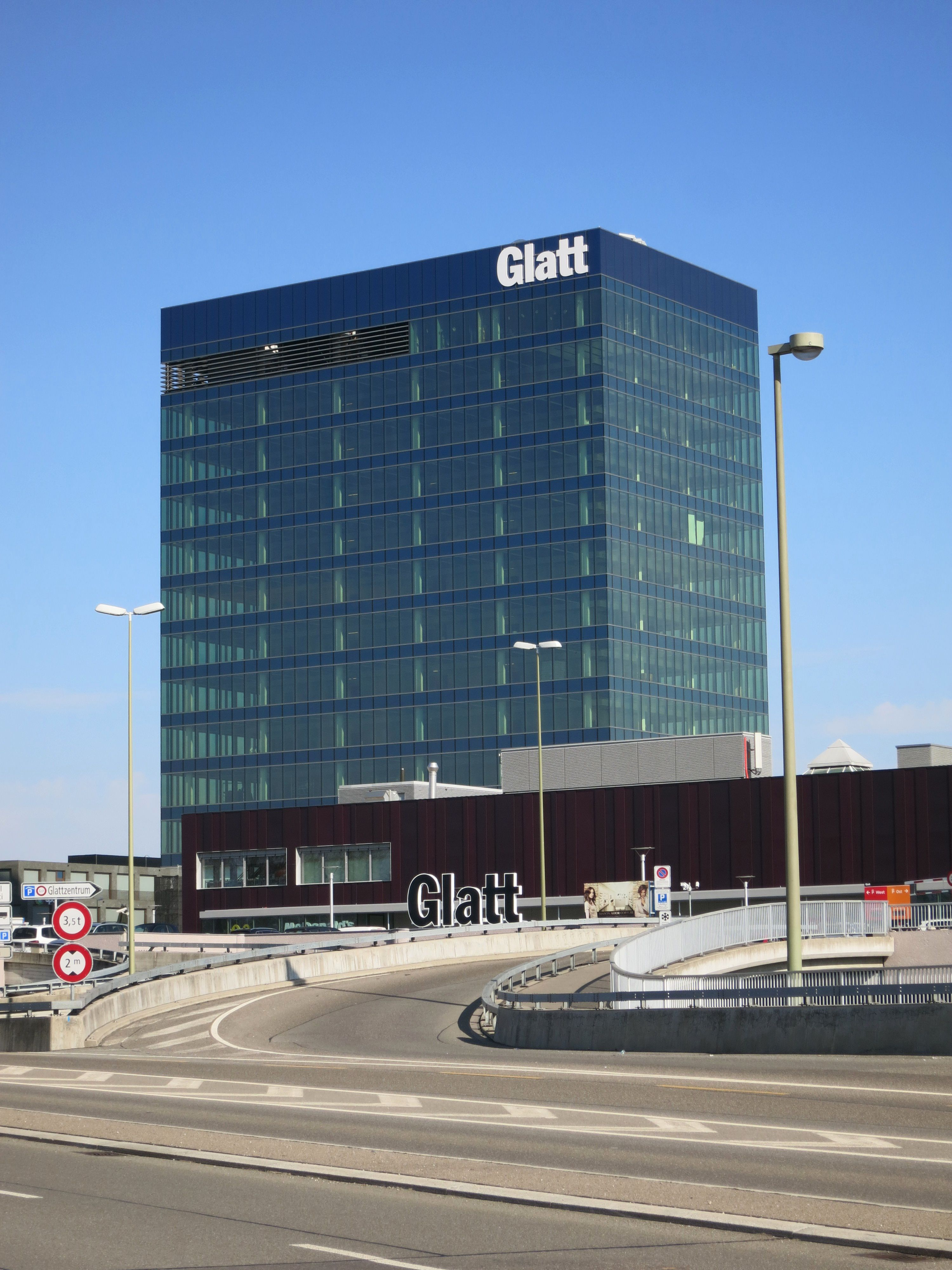 Glattzentrum nach dem Umbau 2019